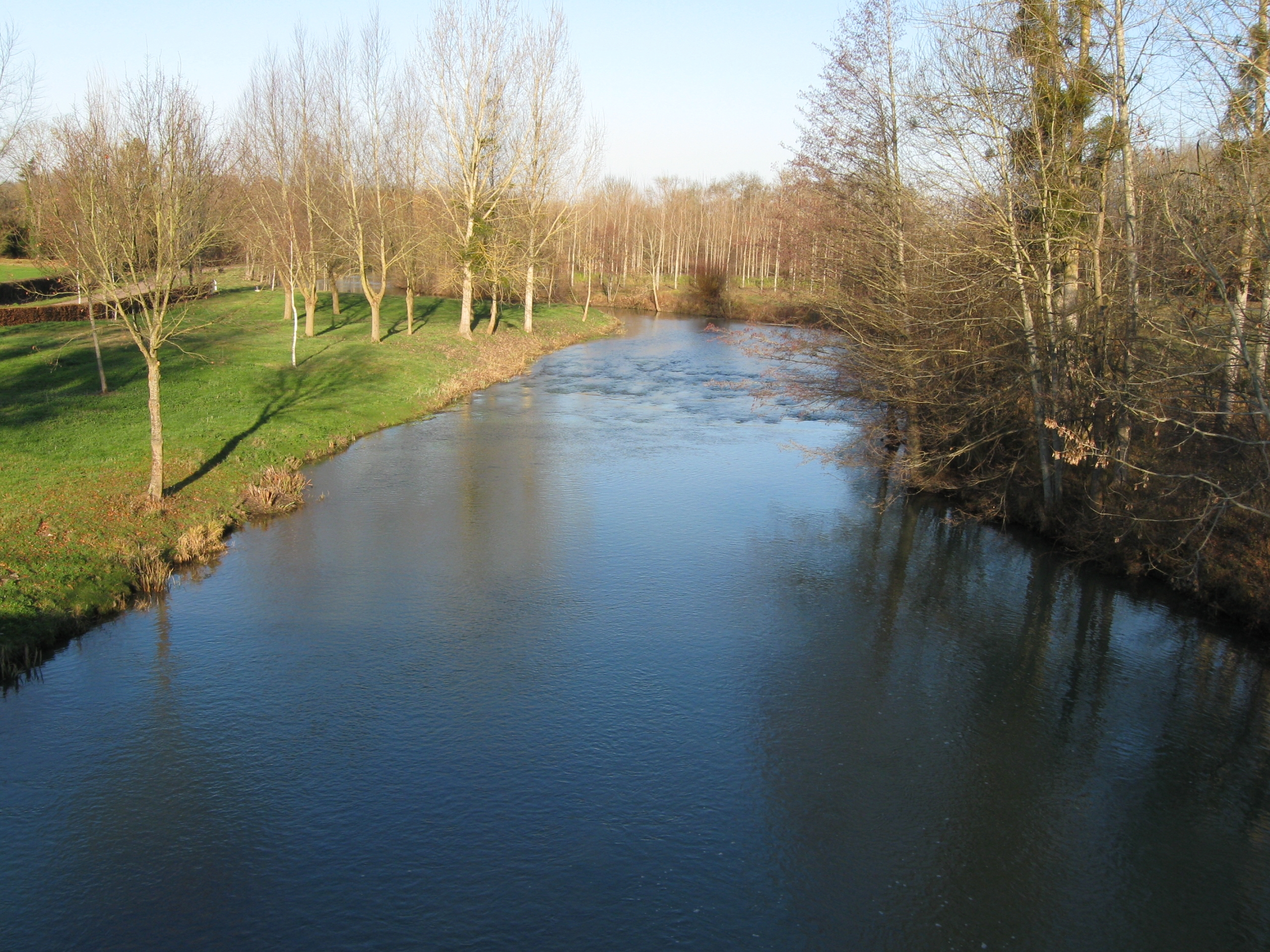 Le loing à Montcresson. Vue vers le nord, depuis le pont sur la D 117.